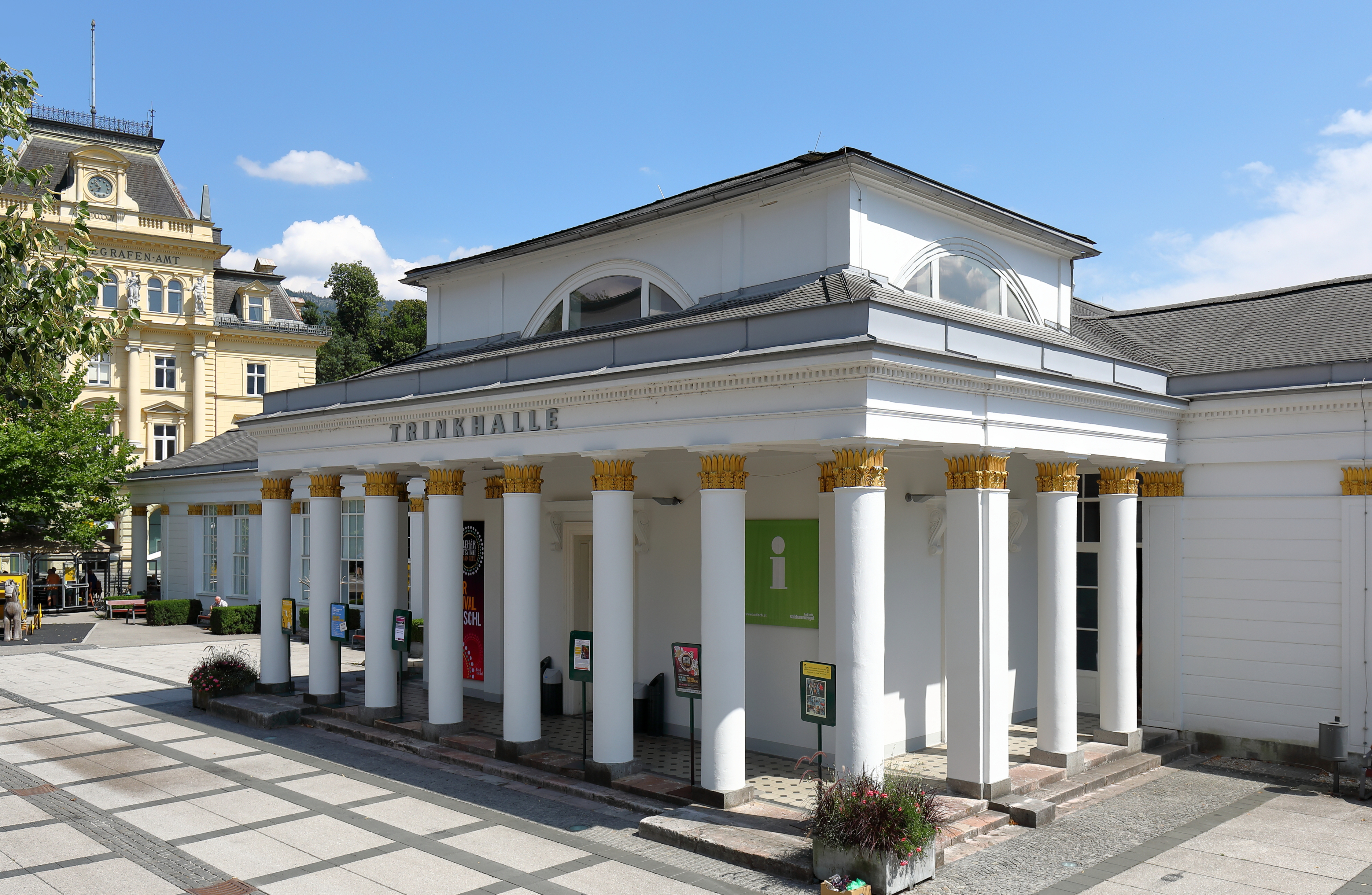 Die Trinkhalle an der Adresse Auböckplatz 5 in der oberösterreichischen Stadtgemeinde Bad Ischl. Die Trinkhalle wurde von 1829 bis 1831 nach Plänen des Architekten Franz Lössl im klassizistischen Stil als Solebadeanstalt erbaut.